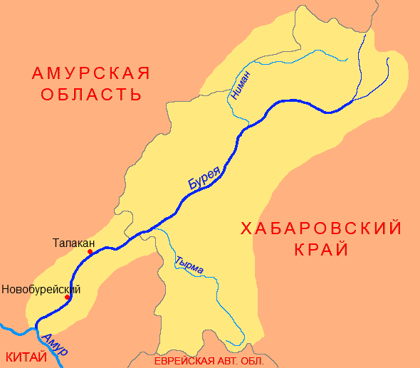 Схема бассейна реки Бурея